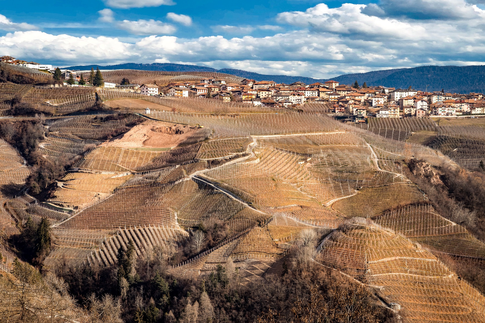 Campo de uva